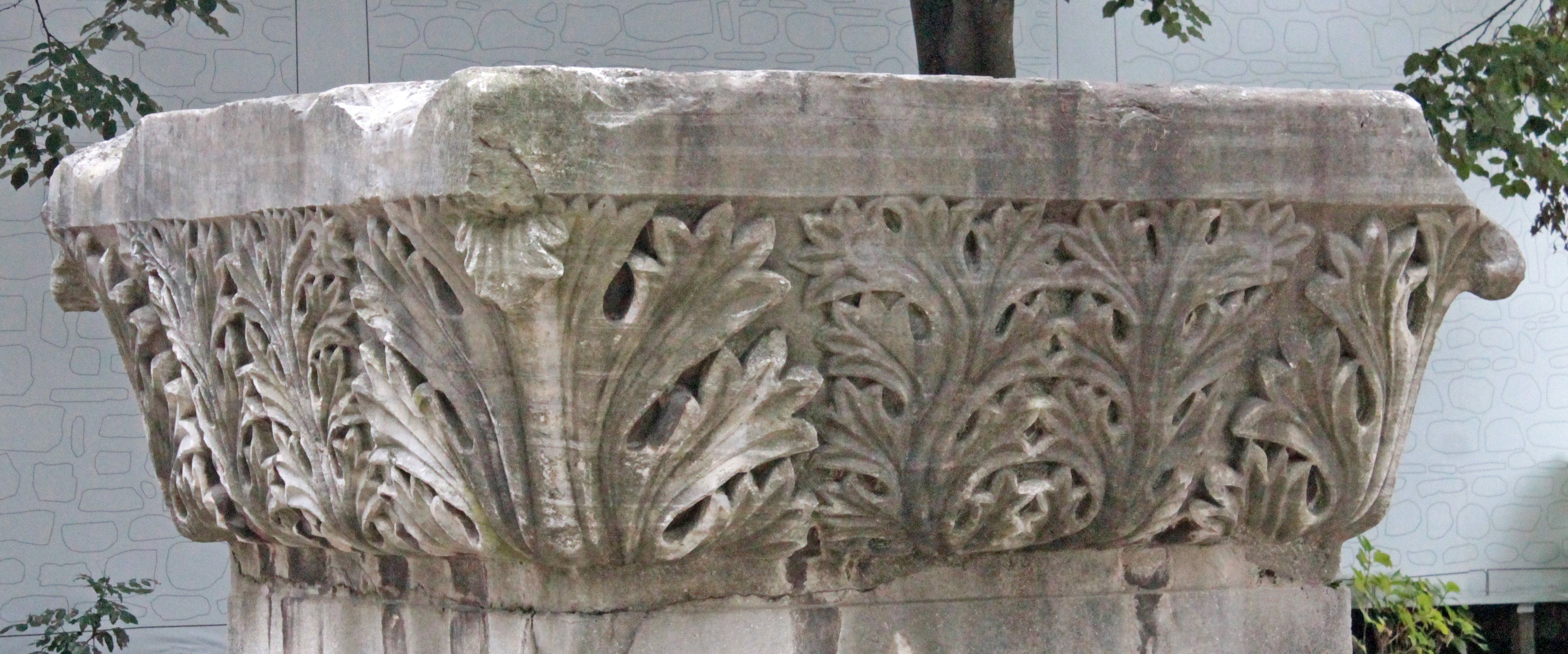 Imposta con decorazione a foglie d'acanto (del tipo della "maschera di acanto"), di dimensioni colossali conservato nel secondo cortile del Topkapı Sarayı, suo luogo di ritrovamento. Per altre foto della medesima imposta vedi File:TopkapiSarayi-SecondoCortile-ColonnaLeoneImposta.jpg e File:Inside arena of Topkapi palace Museum crop.JPG. L'imposta, insieme al sottostante capitello corinzio (vedi File:TopkapiSarayi-SecondoCortile-ColonnaLeoneCapitello.jpg) e ad un rocchio del fusto della colonna (vedi File:TopkapiSarayi-SecondoCortile-ColonnaLeoneFusto.jpg) è attribuito alla colonna eretta dall'imperatore Leone I il Trace nel suo Foro omonimo (Ken R. Dark, Anthea L. Harris, "The Last Roman Forum: the Forum of Leo in Fifth-century Constantinople", in Greek, Roman and Byzantine Studies, 48, 2008, p.60; ricostruzione della colonna di Leone sul sito .)